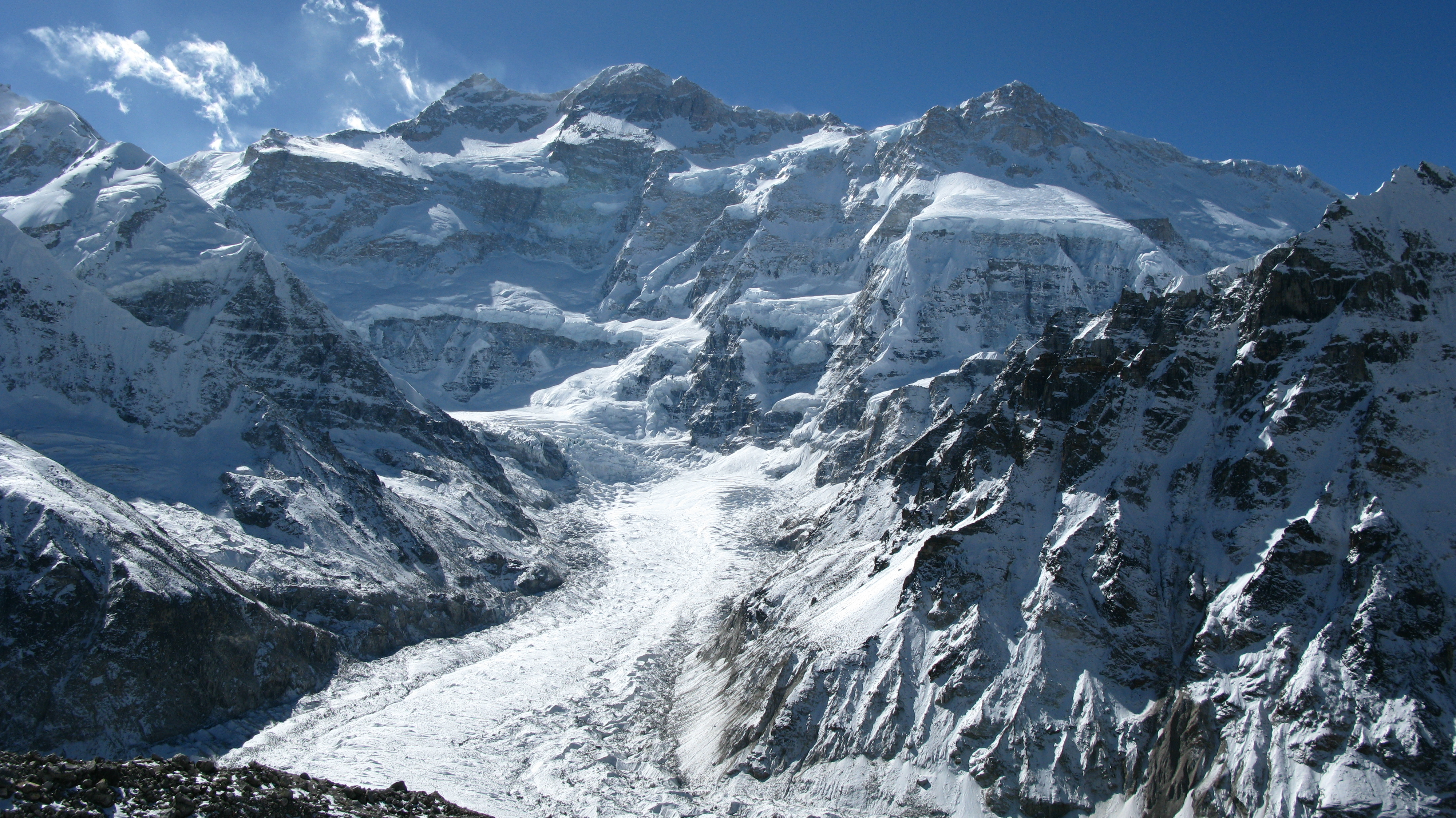 Kangchenjunga from Pang Pema, Nepal